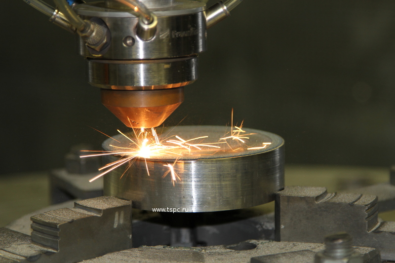 Лазерная наплавка запорной арматуры